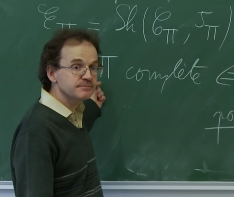 Laurent Lafforgue donnant un cours